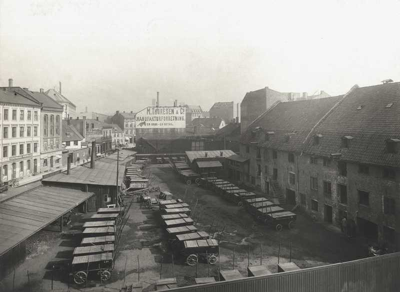 Stenersgaten mot Lilletorget. Lagerbygning, Sukkerhuset, gårdsinteriør, renholdsverket, staller, pudretvogner, bygårder, gateløp, gavlreklame.